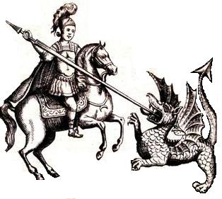 Notre-Dame de Wasmesdimensions : 16 x 25 cmdate : mars 1771 [1771-03]